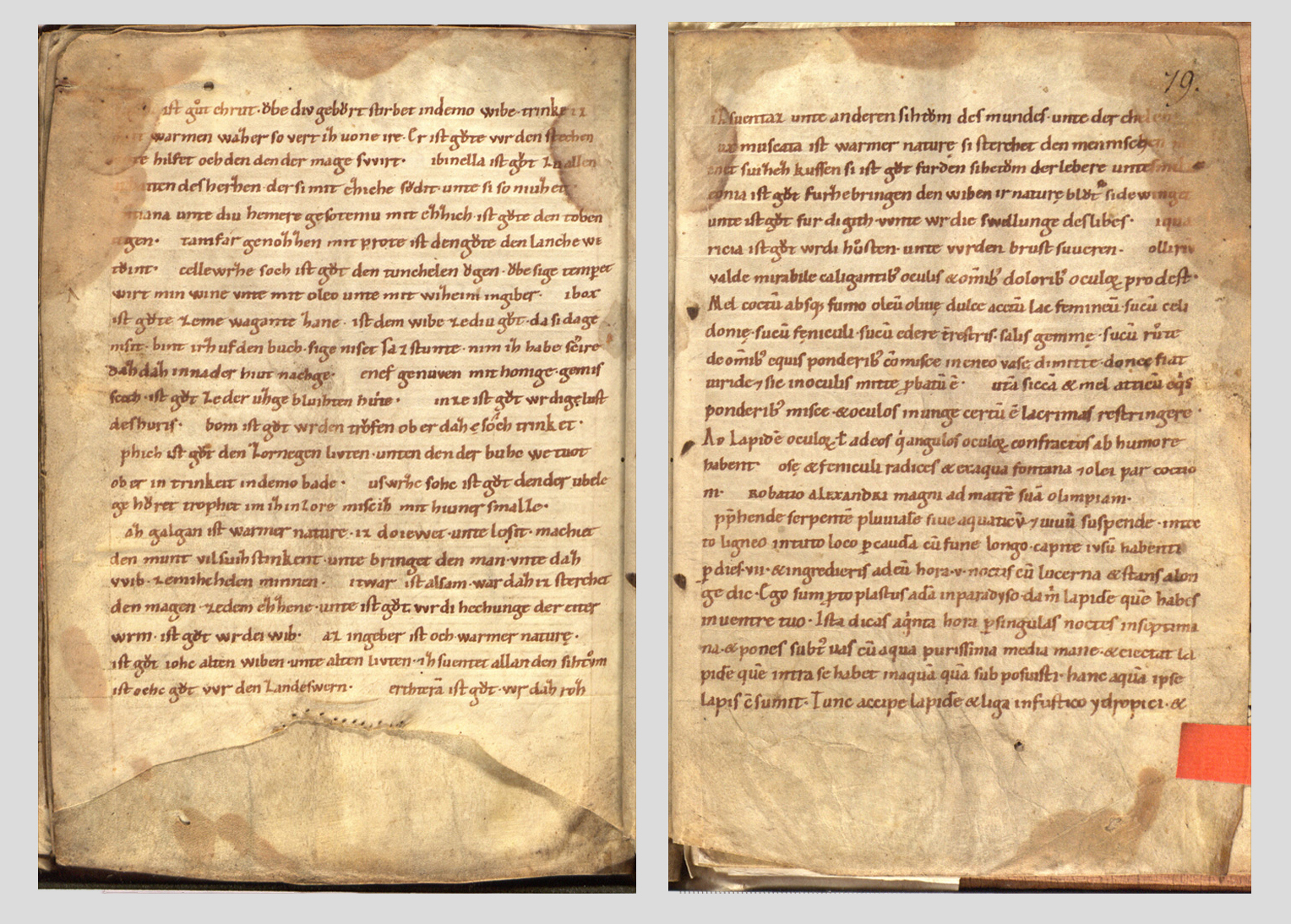 Prüller Kräuterbuch